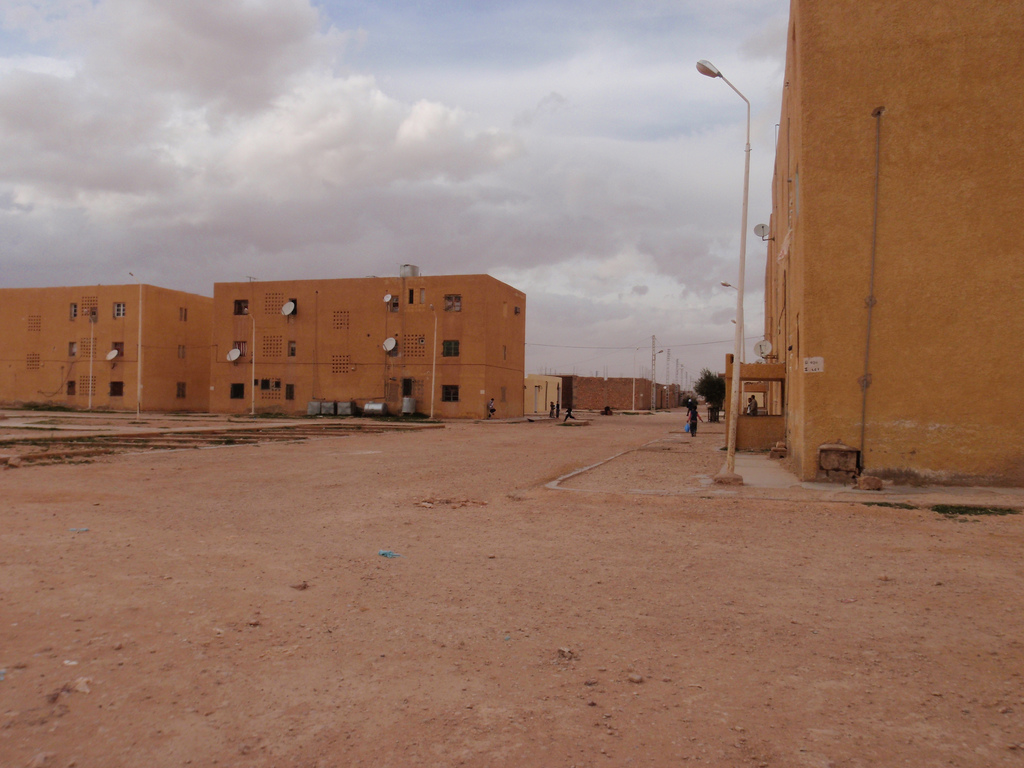 Une place entourée d'immeubles à El Abiodh Sidi Cheikh, ville de la wilaya d'El Bayadh en Algérie.